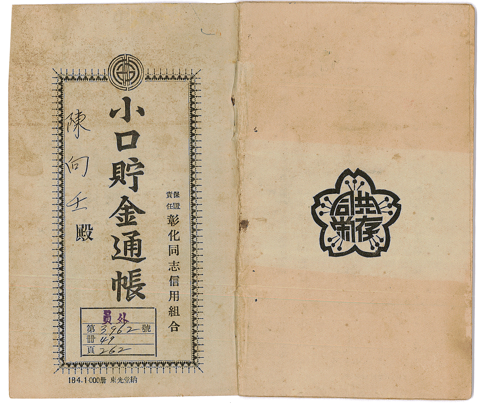 台灣日治時期彰化同志信用組合存摺第3962號，下方「員外」是「地主」的另一種稱呼。